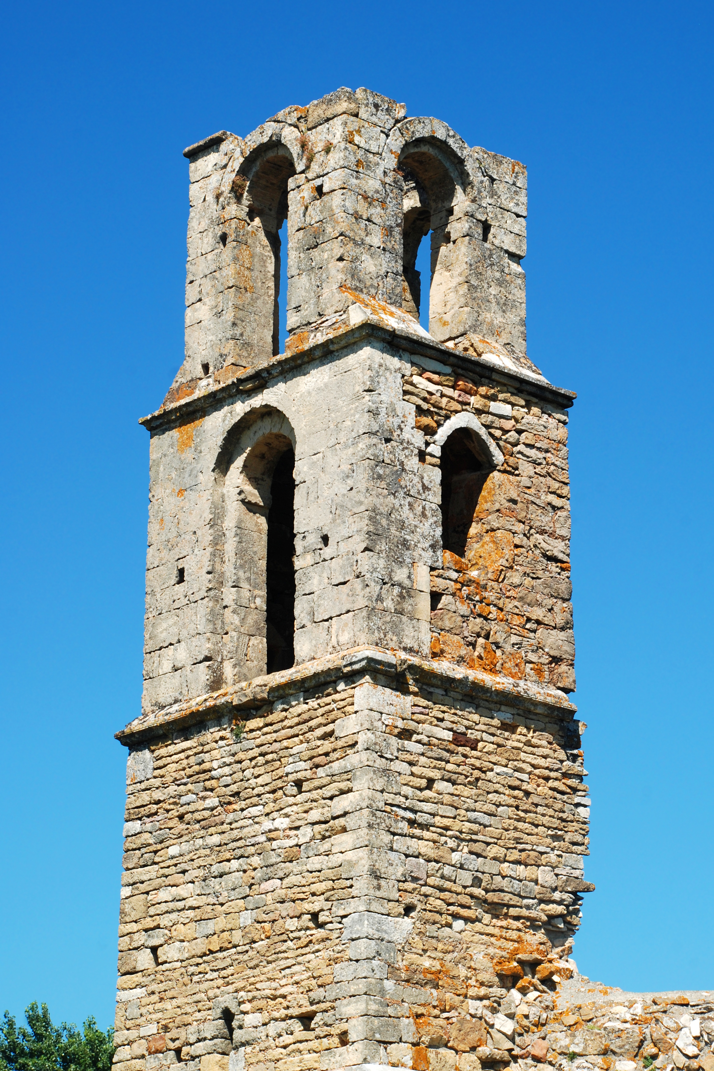 France - Gard - Chapelle Saint-Martin de Saint-Victor-la-Coste .